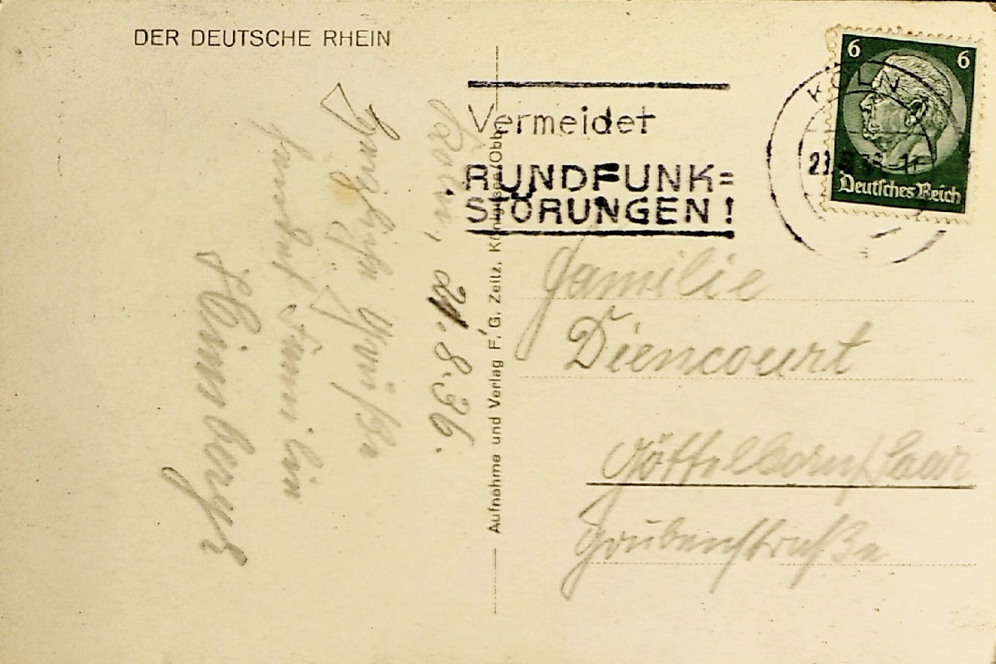 Rückseite einer Postkarte mit dem Stempel vom 21.08.1936. "Vermeidet Rundfunktstörungen!"